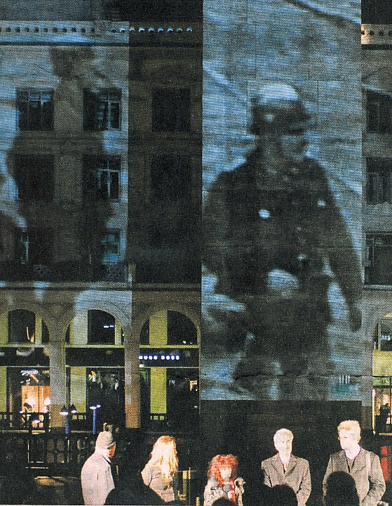 Yohana Hirschfeld Videoinstallation zum 70.Jahrestag des Novemberprogroms